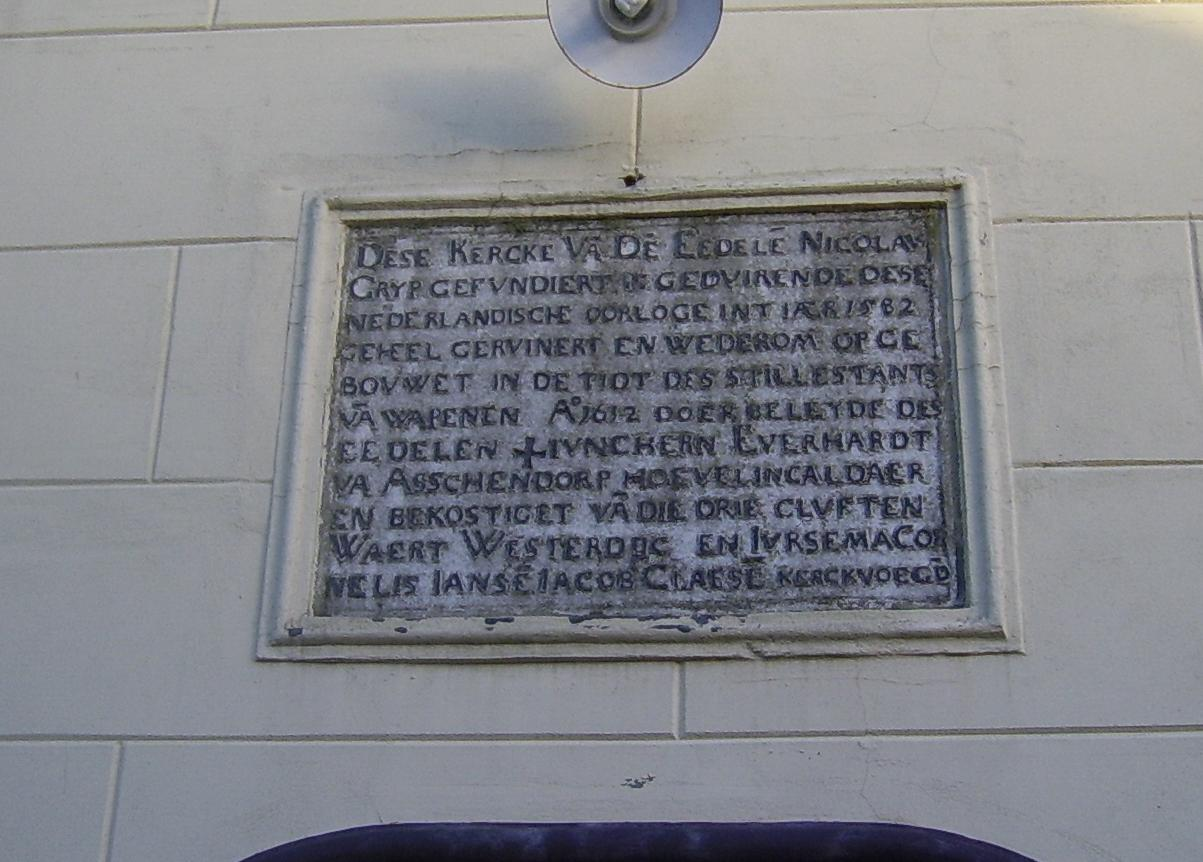 Opschrift boven de kerkdeur van de Nederlands Hervormde kerk van Grijpskerk: "Dese Kercke Va De Eedele Nicolaus Gryp gefundiert, is geduirende dese Nederlandische oorloge in 't iær [jaar] 1582 geheel geruinert en wederom opgebouwet in de tiot [tijd] des stillestants va wapenen, A° [Anno] 1612 doer beleyde des Eedelen Iunckern [jonker] Everhardt Va Asschendorp Hoevelinc aldaar en bekostiget va die drie Cluften, Waert, Westerdyc en Iursema. Cornelis Ianse, Iacob Claese kerckvoegd" Vertaling: "Deze kerk, die door de edele Nicolaas Grijp werd gefundeerd, os gedurende deze Nederlandse oorlog (Tachtigjarige Oorlog) in het jaar 1582 geheel verwoest en weer opgebouwd ten tijde van de wapenstilstand (Twaalfjarig Bestand), namelijk in 1612 onder verantwoordelijkheid van de edele jonker (Johan) Everhardt van Asschendorp, hoveling (hoofdeling) aldaar en bekostigd door de drie kluften Waard, Westerdijk en Juursema(kluft). Cornelis Jansen, Jacob Claes kerkvoogd." De kerk werd in 1582 verwoest door plunderende staatse oorlogsbenden vanuit de Niezijlster schans.